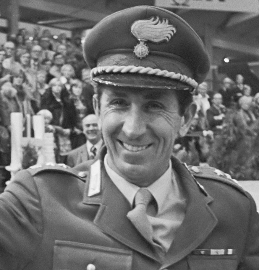 Jumping Amsterdam ; winnaar Grote Prijs Amsterdam de Italiaan Raimondo d'Inzeo met beker zittend op gewonnen Fiat 26 november 1976